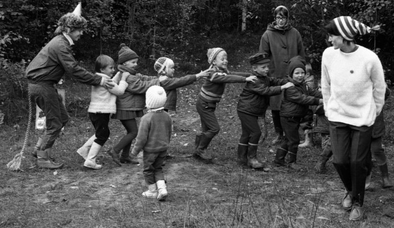 Skogsmulleskola 1966